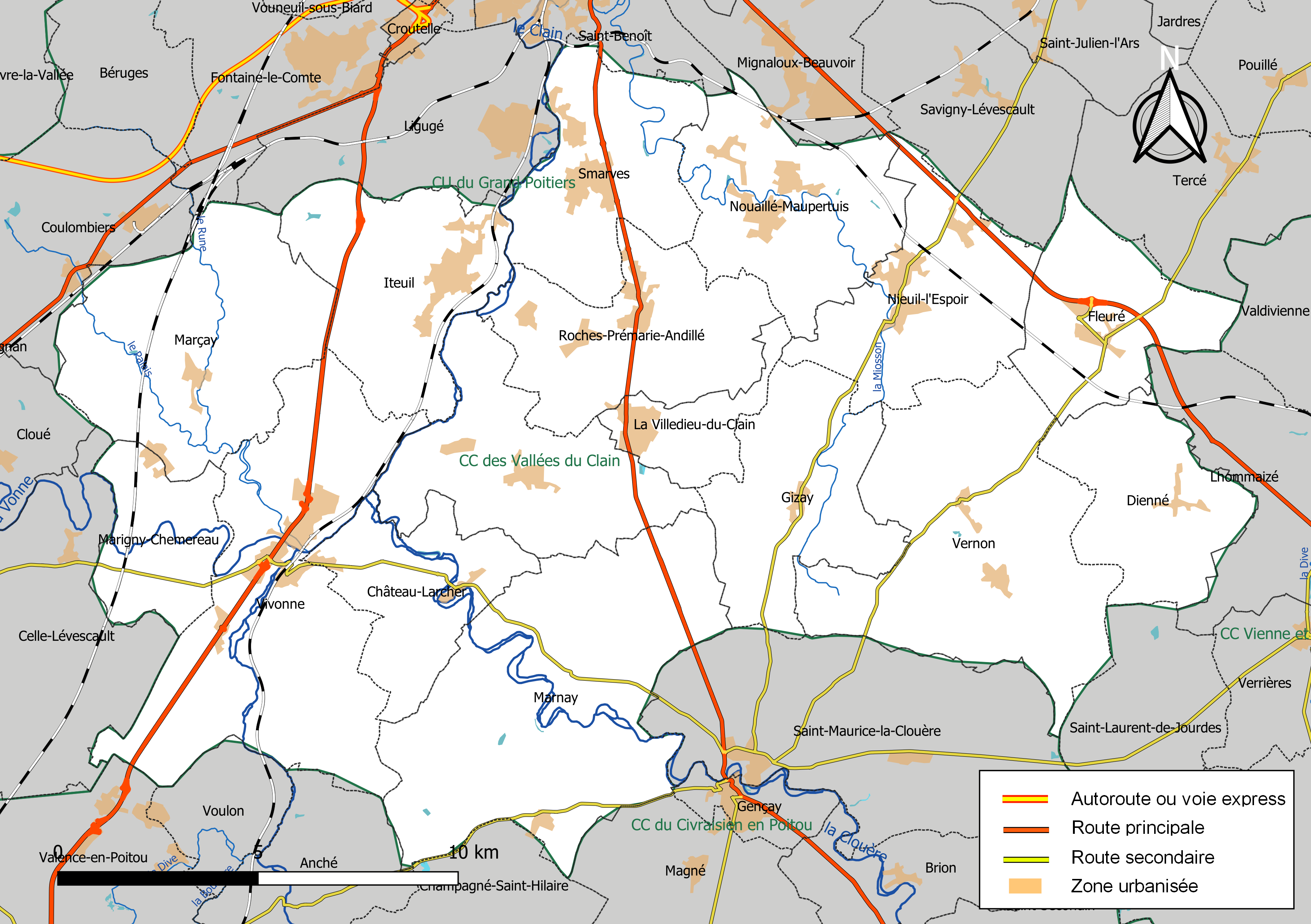 Carte géographique de la Communauté de communes des Vallées du Clain, département de la Vienne, France. Composition au 1er janvier 2019.